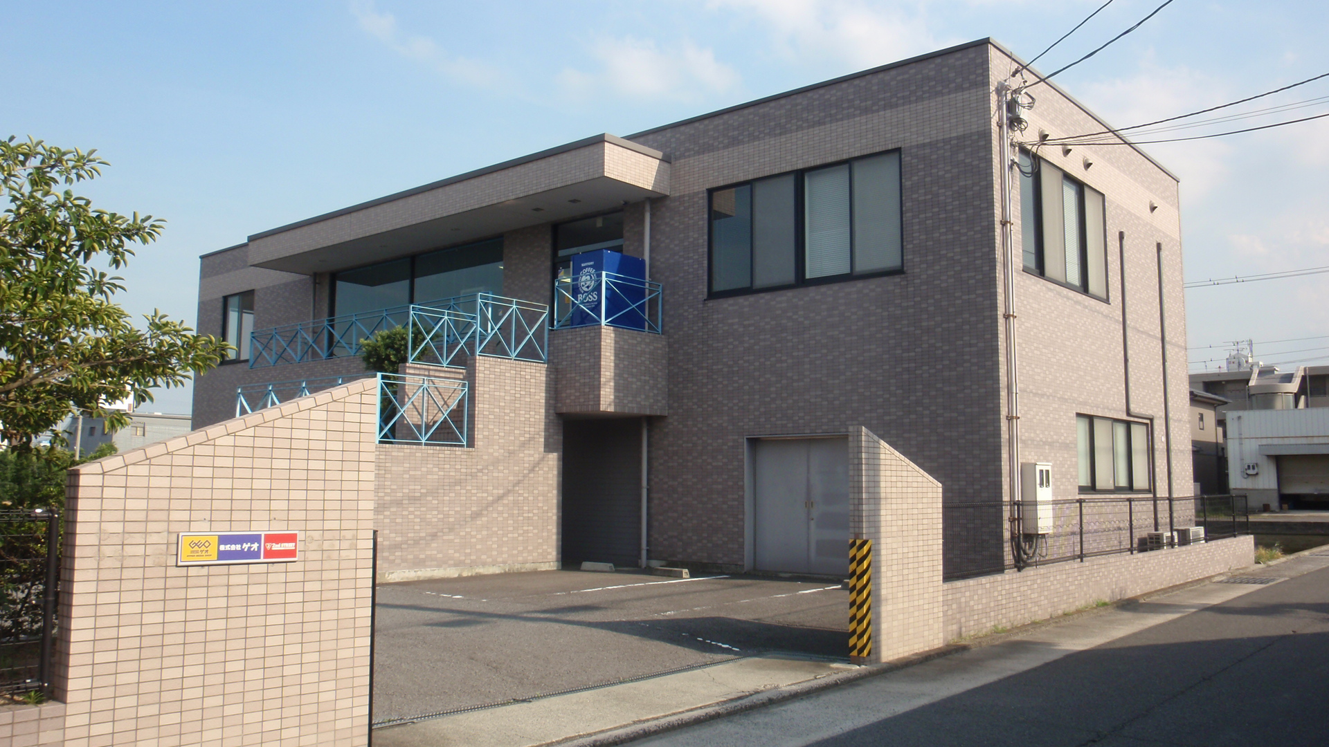 香川県高松市にある株式会社セカンドストリート本店。本社は愛知県春日井市。